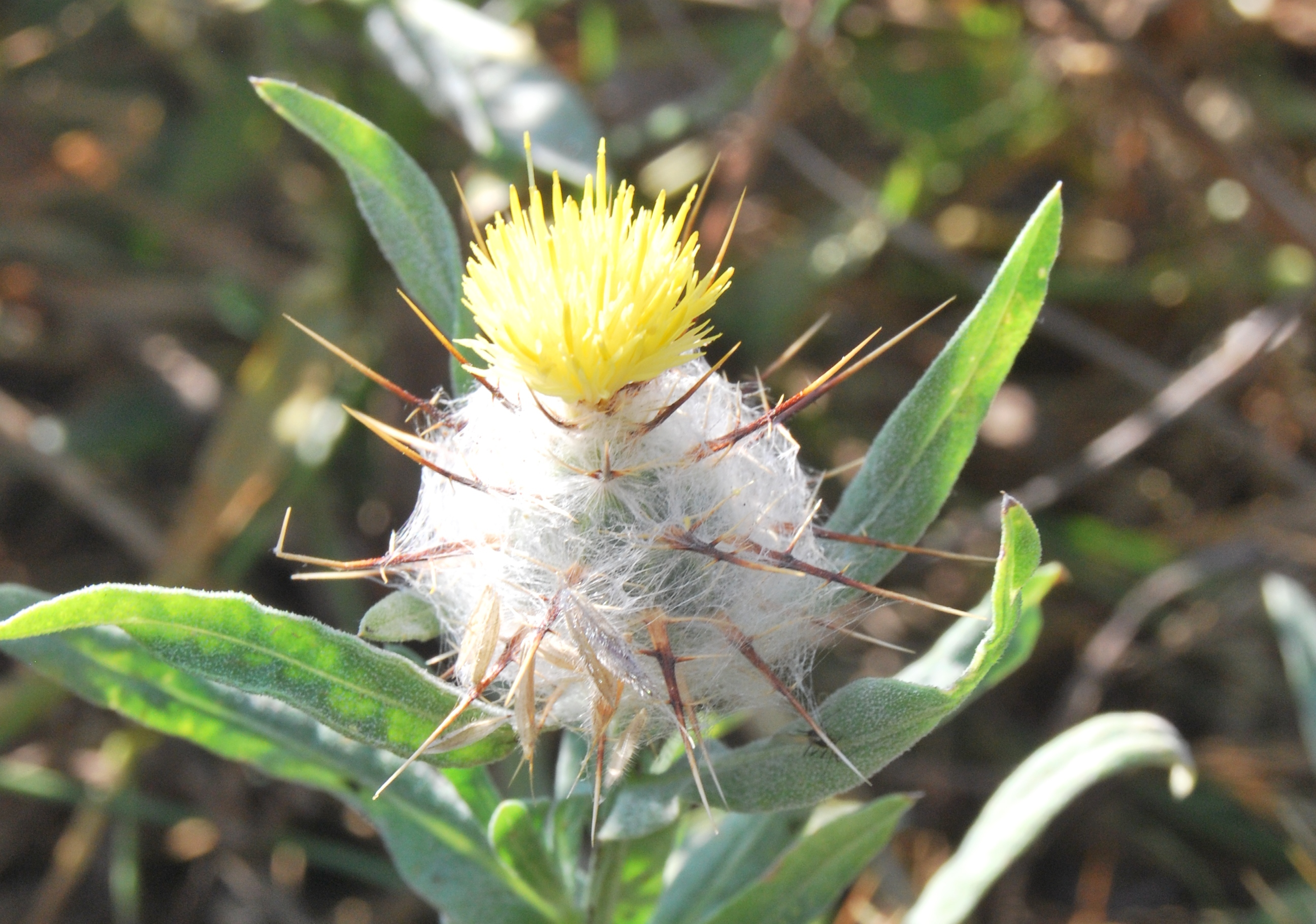 Centaurea eriophora, capítulo en flor